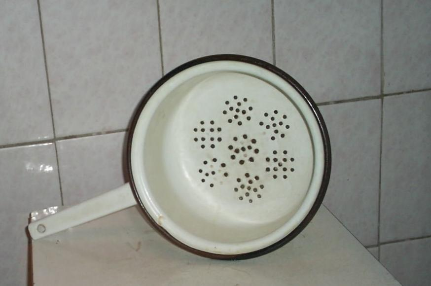 Дуршлаг, предмет кухонной утвари